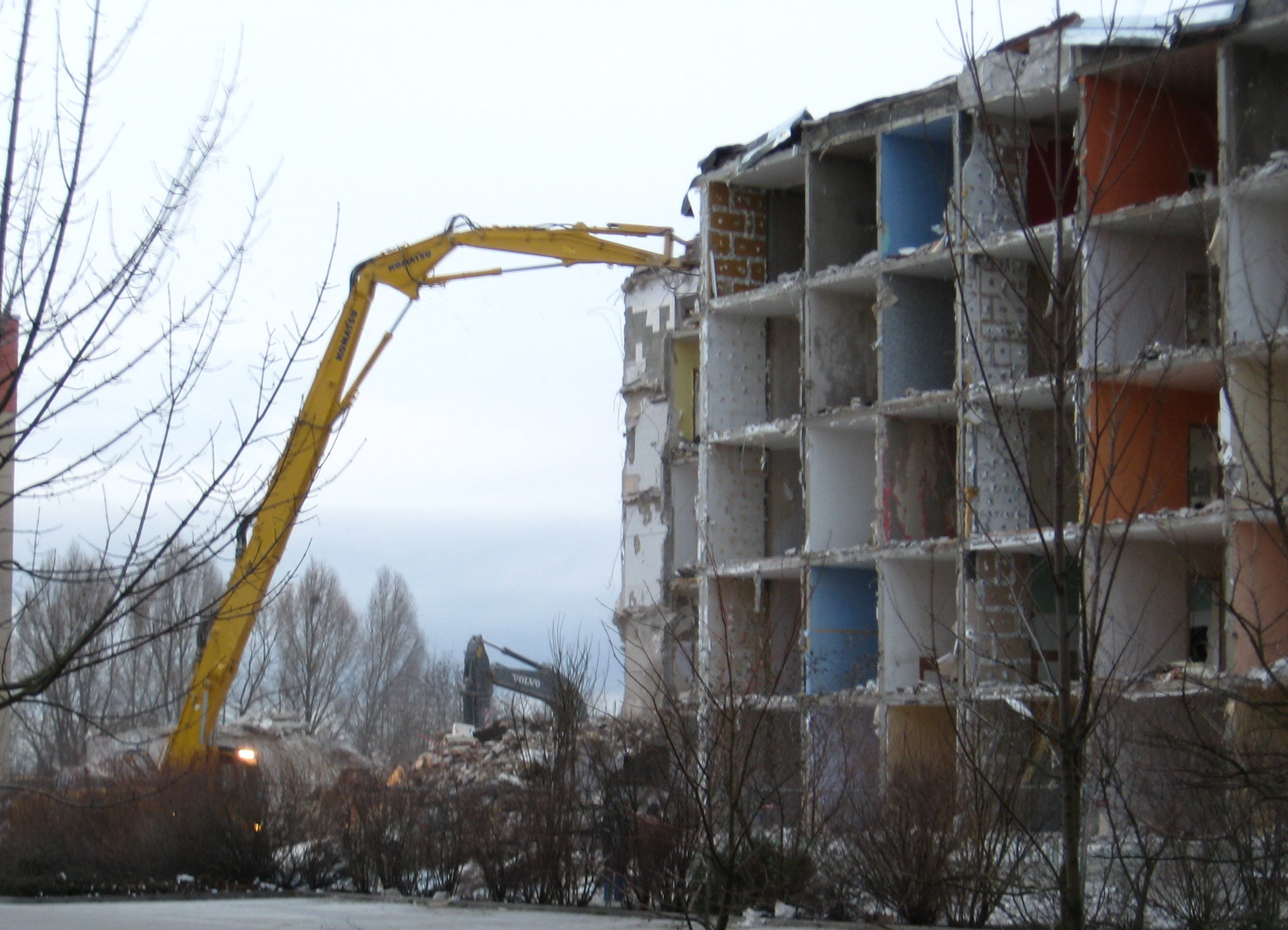 Haus Lelitzer Str. 98-101 in Köthen (Anhalt) vor dem Abriß. Blick Richtung Nordwest.